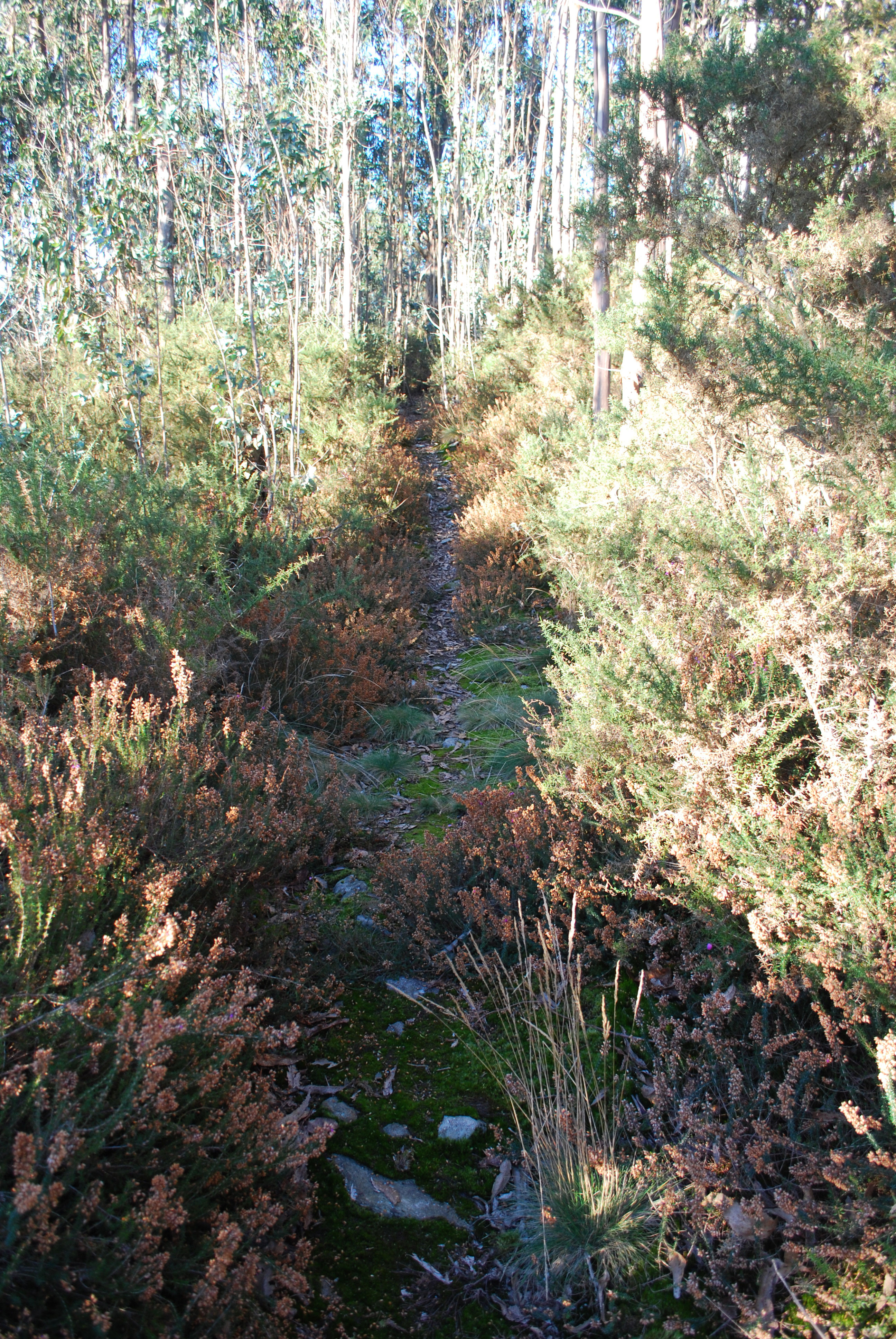 Camiño NS dentro do castro de pereiruga Sedes Narón A Coruña Galiza